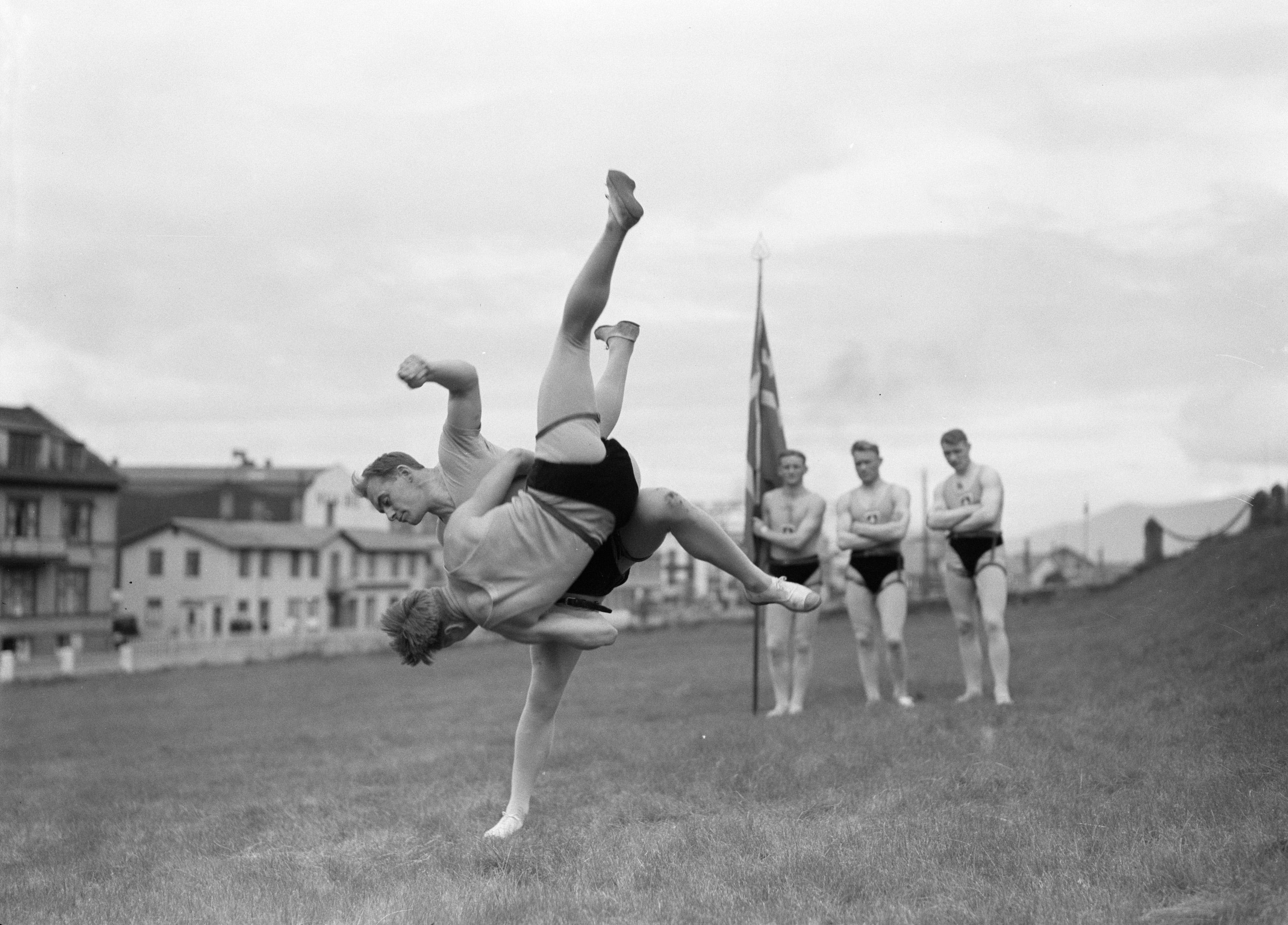 Collectie / Archief : Fotocollectie Van de Poll Reportage / Serie : IJsland Beschrijving : Reykjavik. IJslands worstelen (Glima). Twee leden van het glimateam van de Menntaskolinn in aktie. De andere teamleden, van wie een met een vaandel, kijken toe Datum : 1934 Locatie : IJsland, Reykjavik Trefwoorden : sportverenigingen, vecht- en verdedigingssporten, worstelen Fotograaf : Poll, Willem van de Auteursrechthebbende : Nationaal Archief Materiaalsoort : Glasnegatief Nummer archiefinventaris : bekijk toegang 2.24.14.02 Bestanddeelnummer : 190-0274